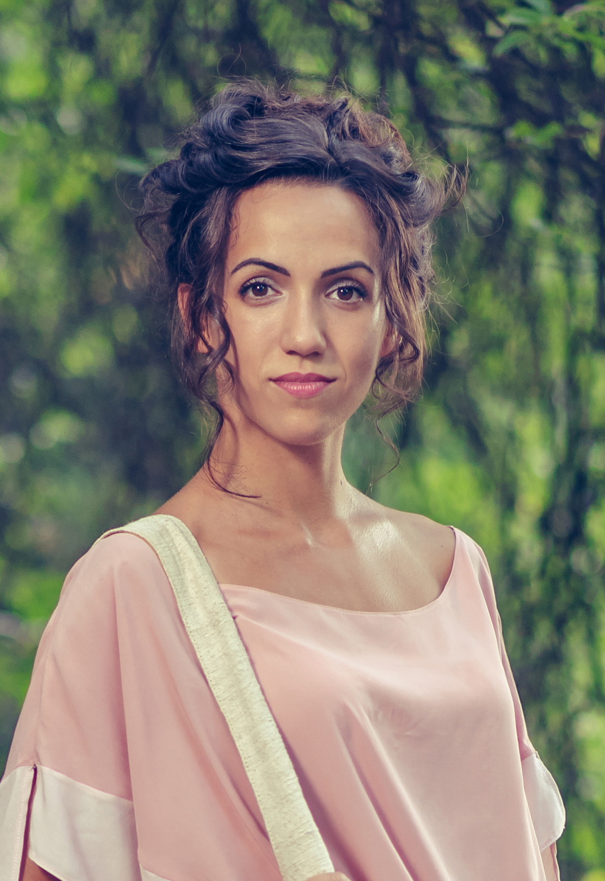 Danica Veselinović, srpska slikarka.